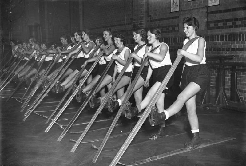 Berlin 1933, Trockenski in der Halle: Lustiger Unterricht.